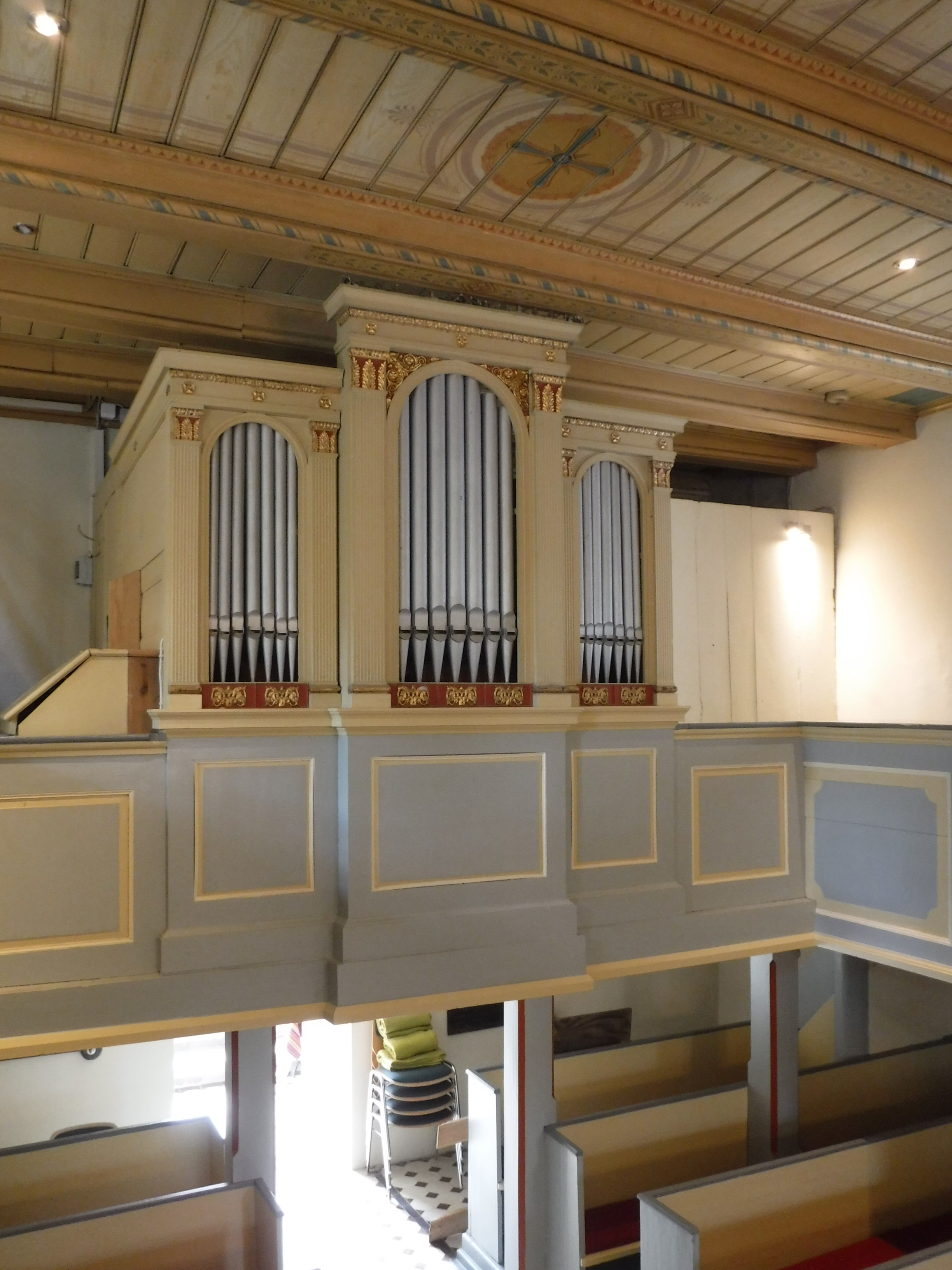 Orgel in der Dorfkirche Genshagen (1785 von Meister Pinkert, Luckenwalde; 1911 von Schuke, Potsdam erneuert; 2003 von Soldan, Ober Prauske erneurt